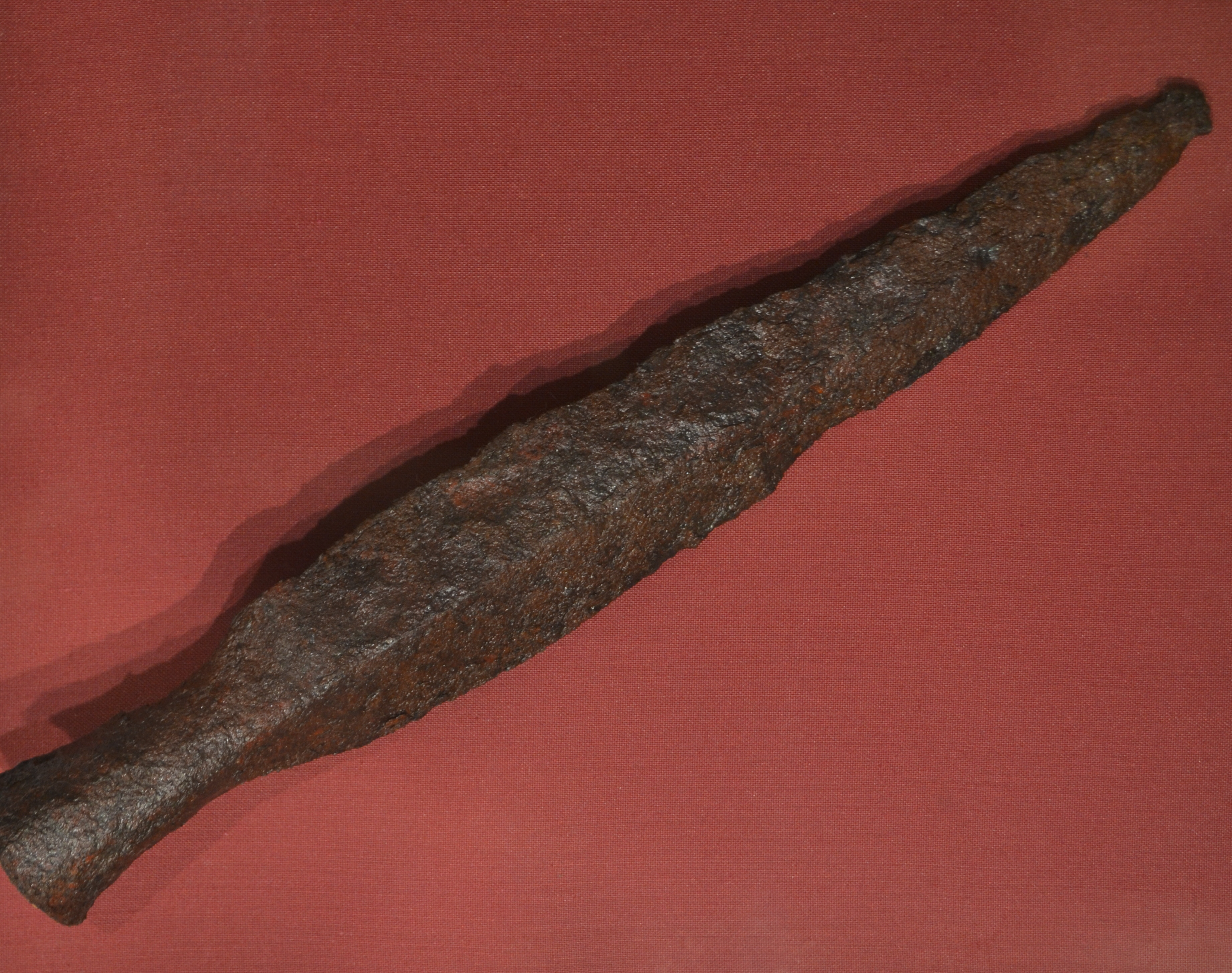 Ascona (punta de llança). Segle XIII. Torre-portal de Riquer (Alcoi). Museu Arqueològic Municipal d'Alcoi.